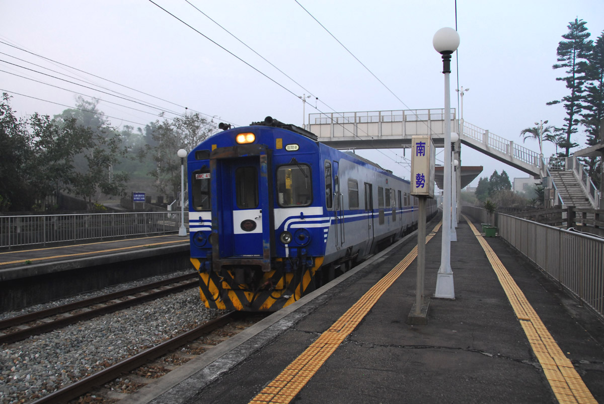 南勢車站月台，一列EMU400型電聯車（EMU411號）正好進站。苗栗縣苗栗市。